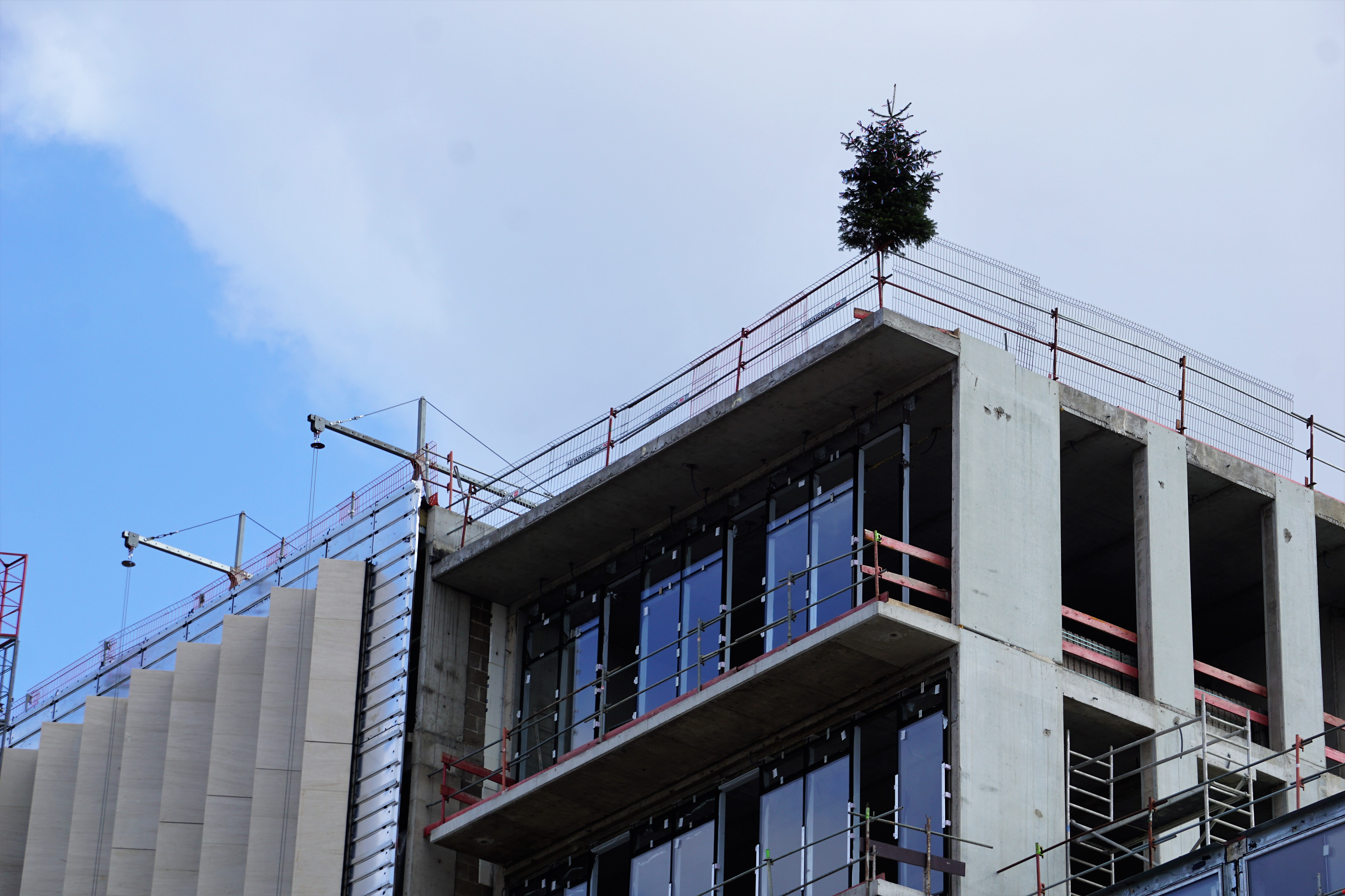 De Schantjen «Royal Hamilius» am Abrëll 2019.